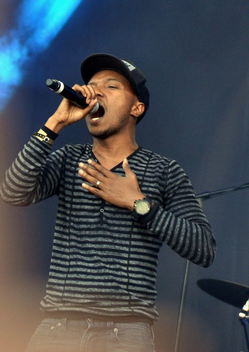 Soprano au concert pour l'égalité de SOS-Racisme